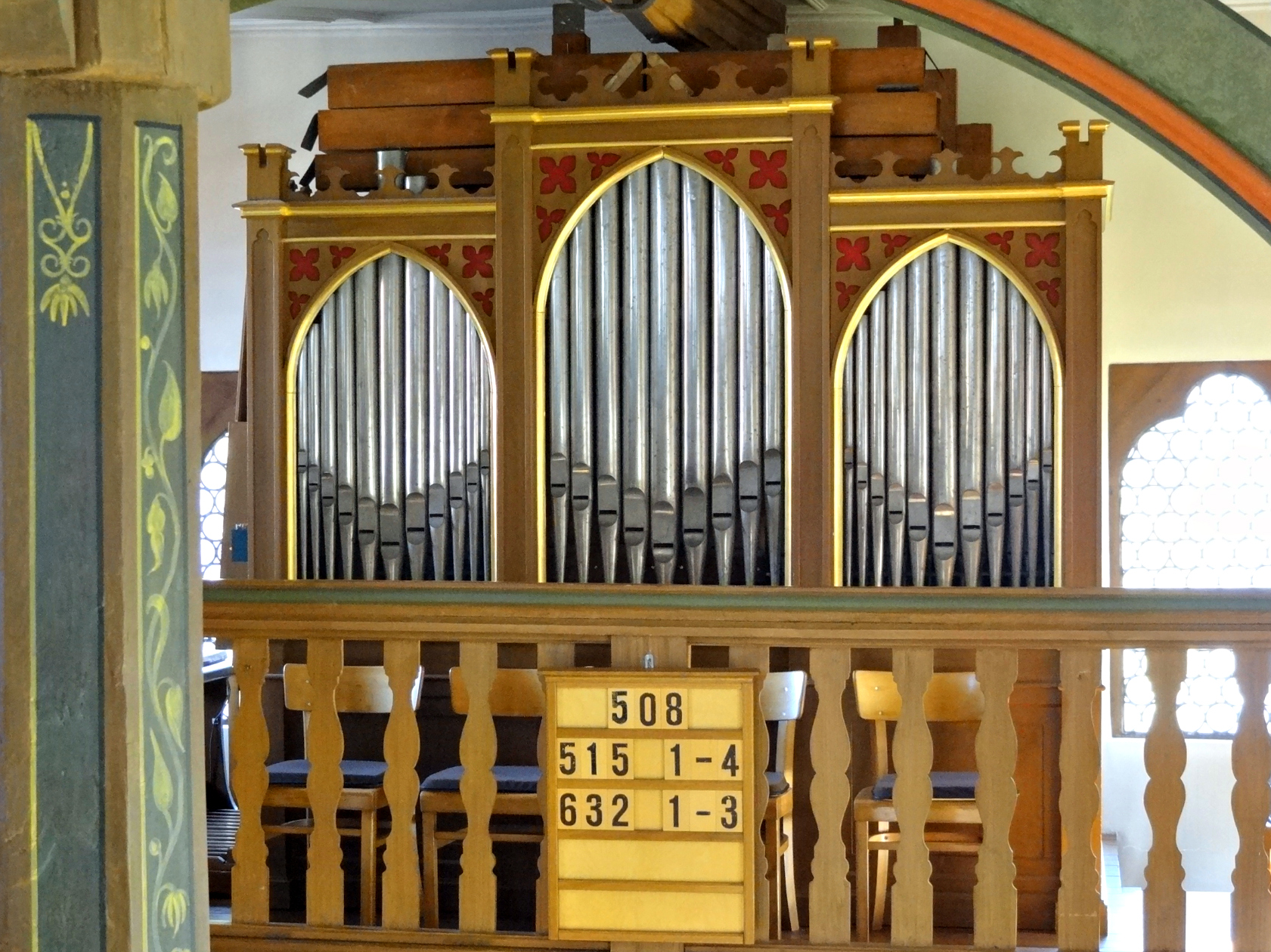 Evangelische Kirche (Lardenbach)